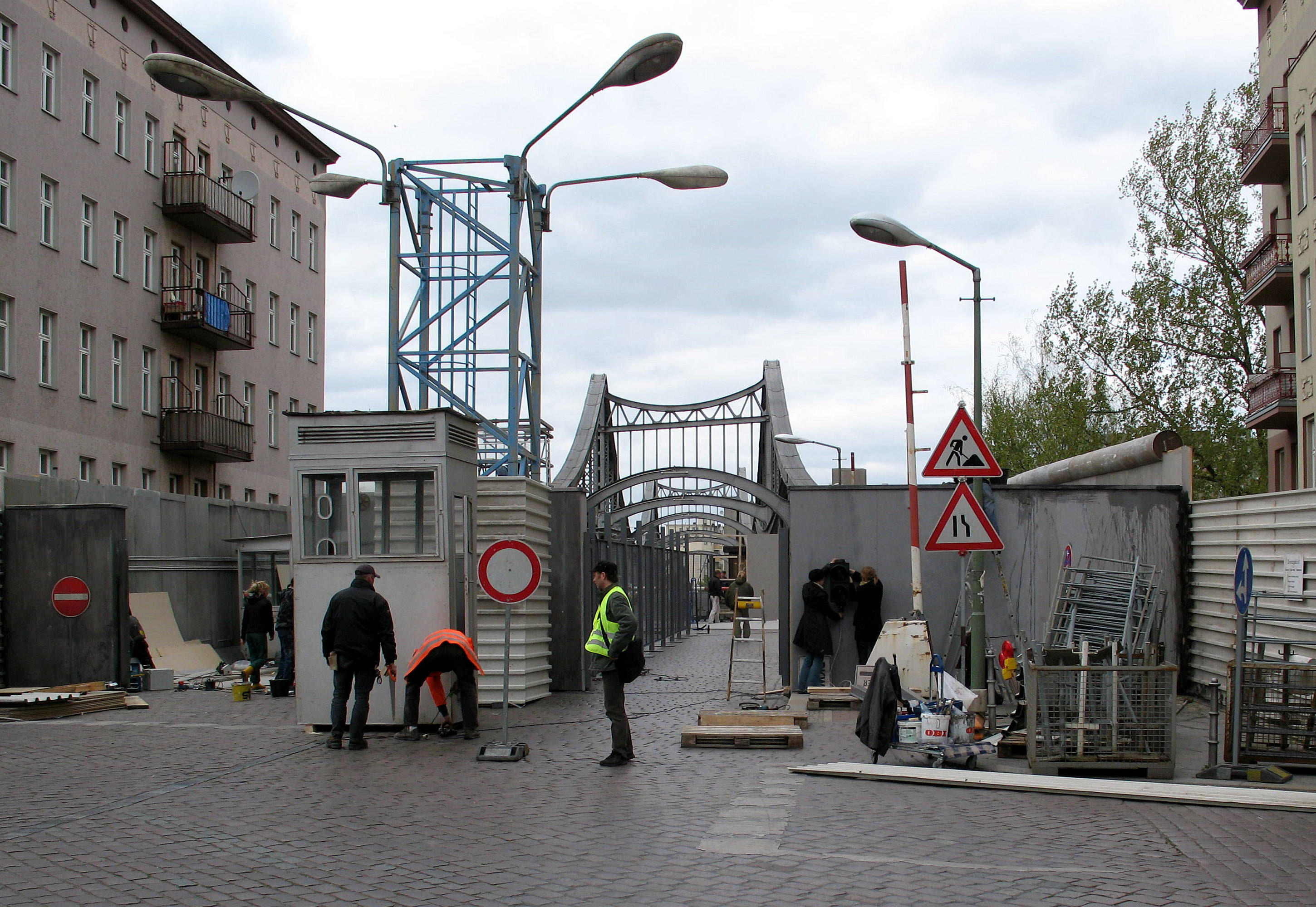 Drehort zum Film: Die Frau vom Checkpoint Charlie. Die Brücke an der Swinemünder Straße Ecke Ramlerstraße soll den Grenzübergang Bornholmer Straße darstellen.